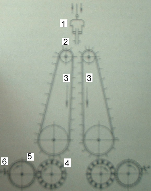 Schema:Hechelmaschine für Bastfasern